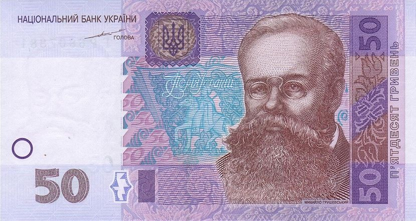 Ukraine 50 Hryven 2004 front